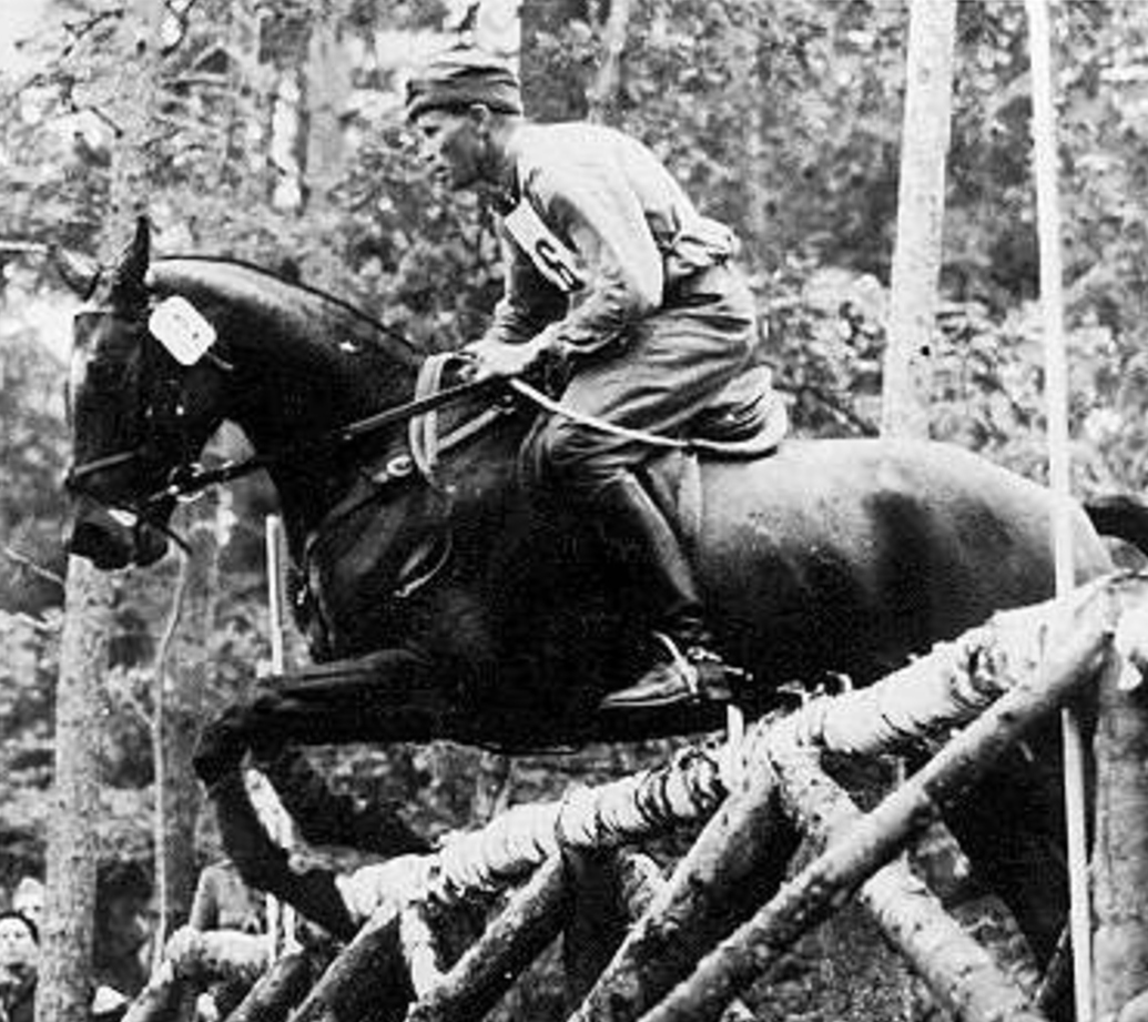 Ryttarolympiaden i Stockholm 1956. Sergeant Petrus Kastenman på Iluster under fälttävlans terrängprov ute på Järvafältet, norr om Stockholm. Kastenman segrade i Stockholmsolympiadens fälttävlan.